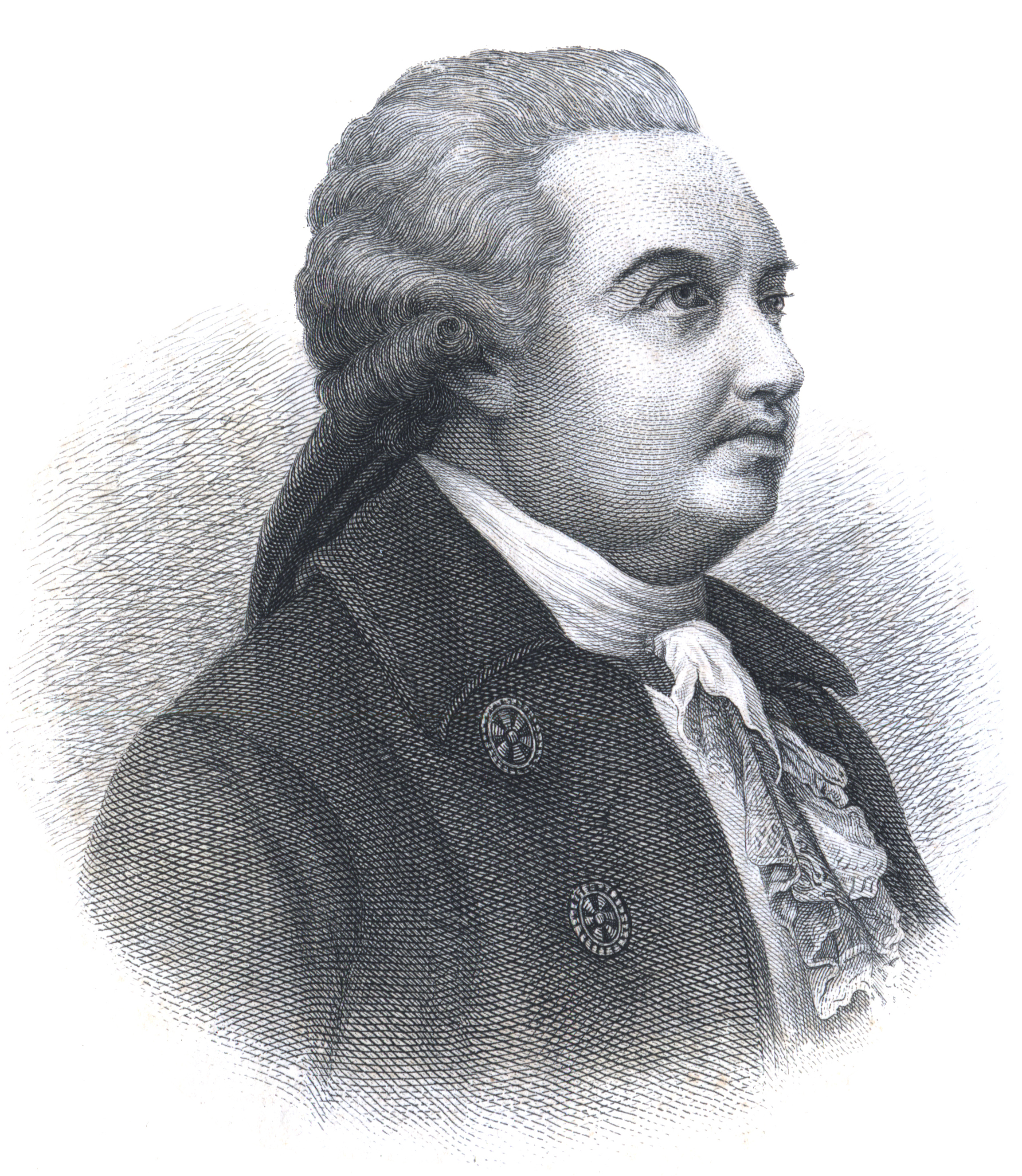 Денис Иванович Фонвизин